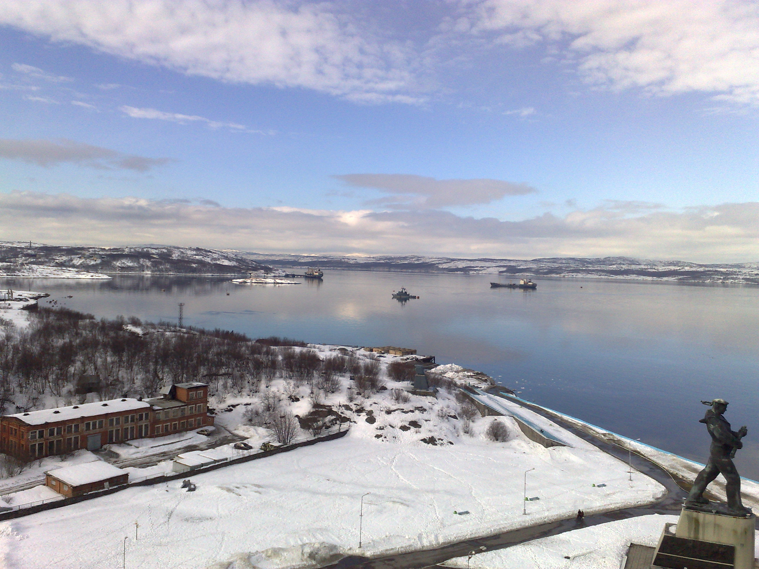 Кольский залив. Североморск